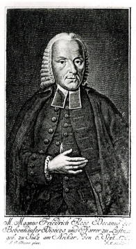 Portrait Magnus Friedrich Roos: Kupferstich von Johann Michael Söckler (1744–1781) nach einem Bild von Jakob Friedrich Dörr (1750–1788).